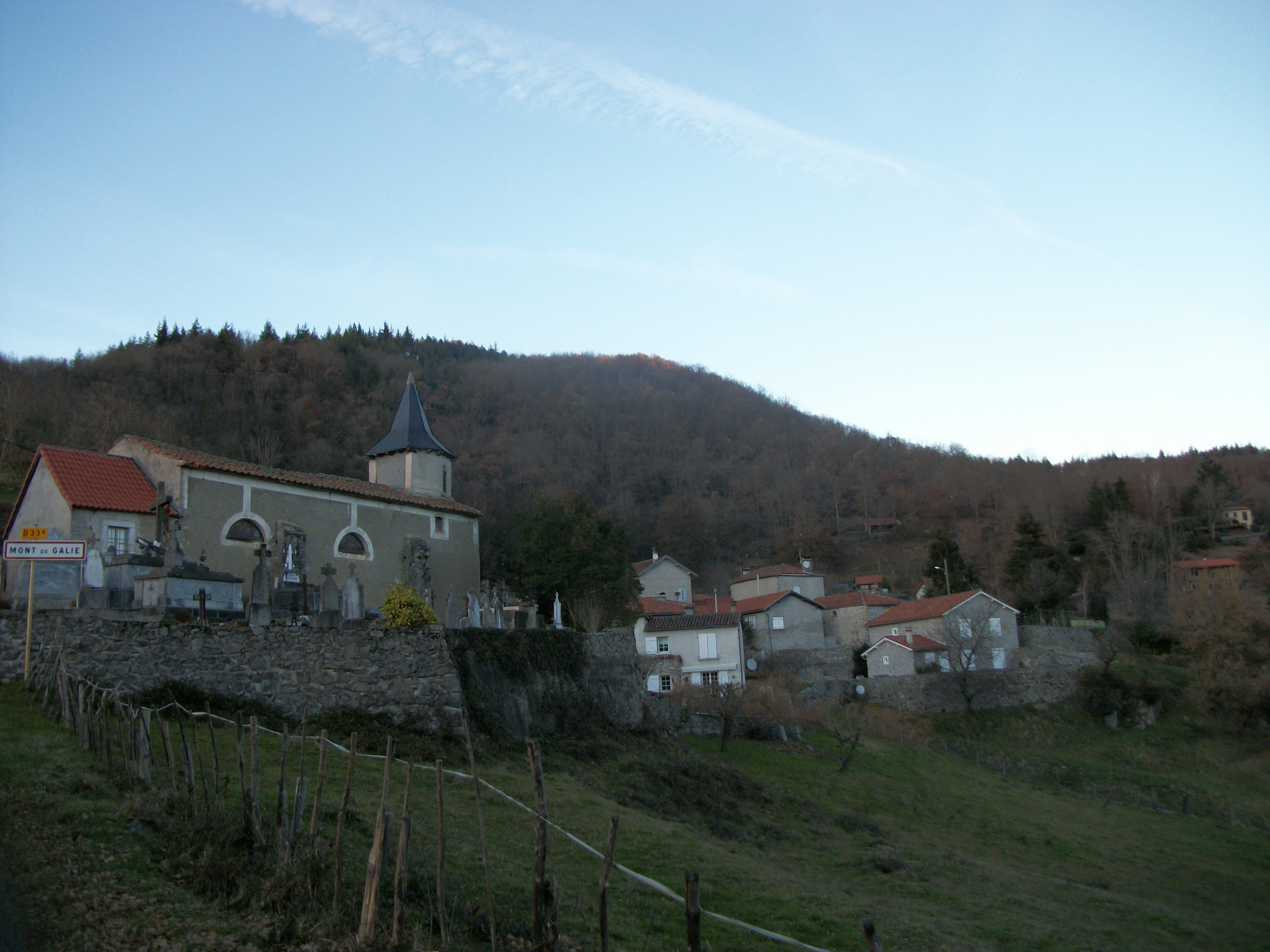 Village